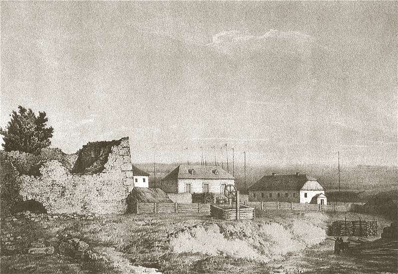 "Karolin near Pińsk" (Karolin pod Pińskiem), a sketch by Napoleon Orda ca. 1877, pencil and watercolours. The original description reads: Ruiny Zamku Xiążąt Wiszniowieckich. Zniszczony został r. 1709 w czasie wojen Piotra W-go przeciw Karolowi XII.